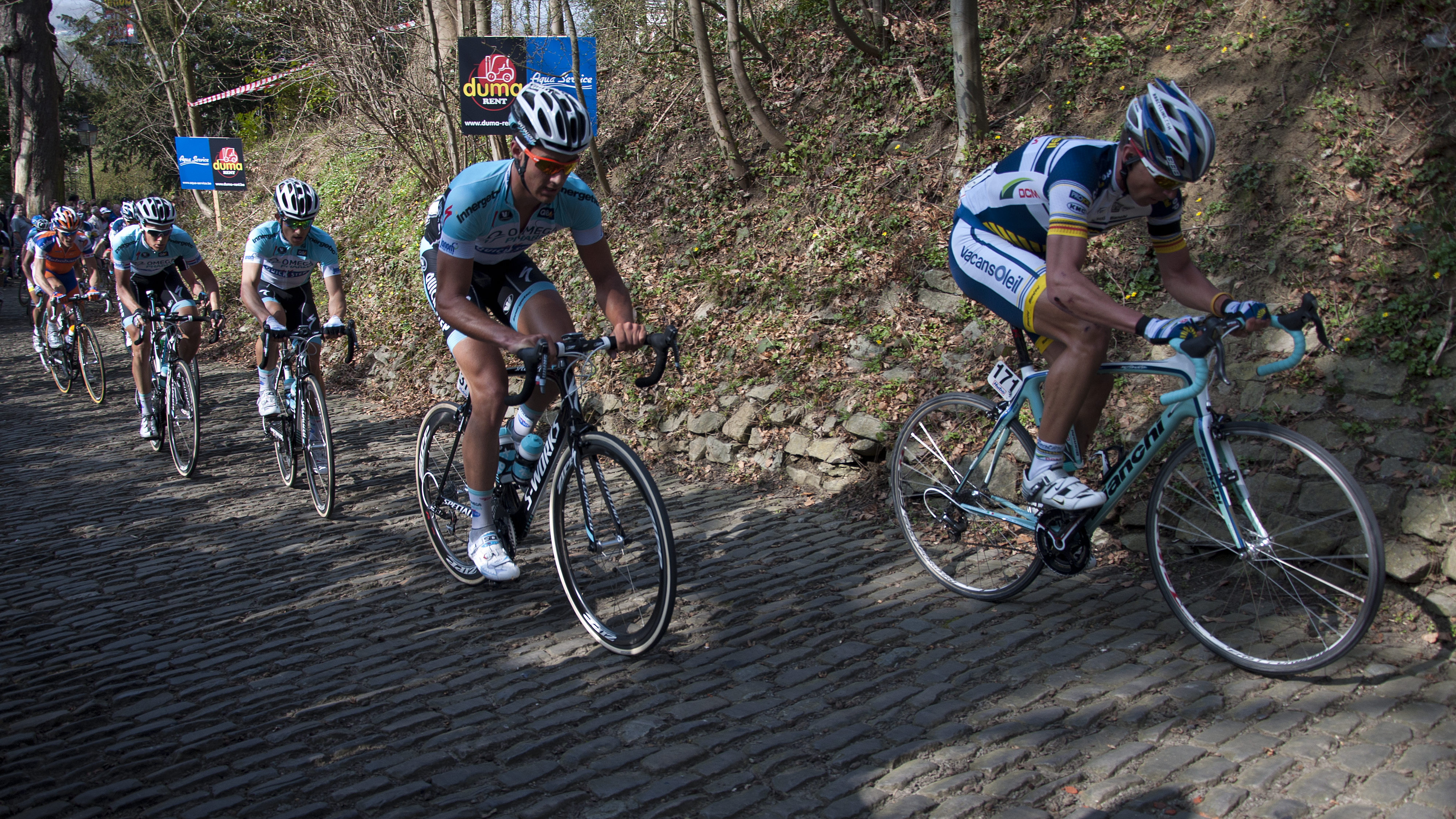 Stijn Devolder en Guillaume Van Keirsbulck op de Muur van Geraardsbergen tijdens de E3 Harelbeke 2012